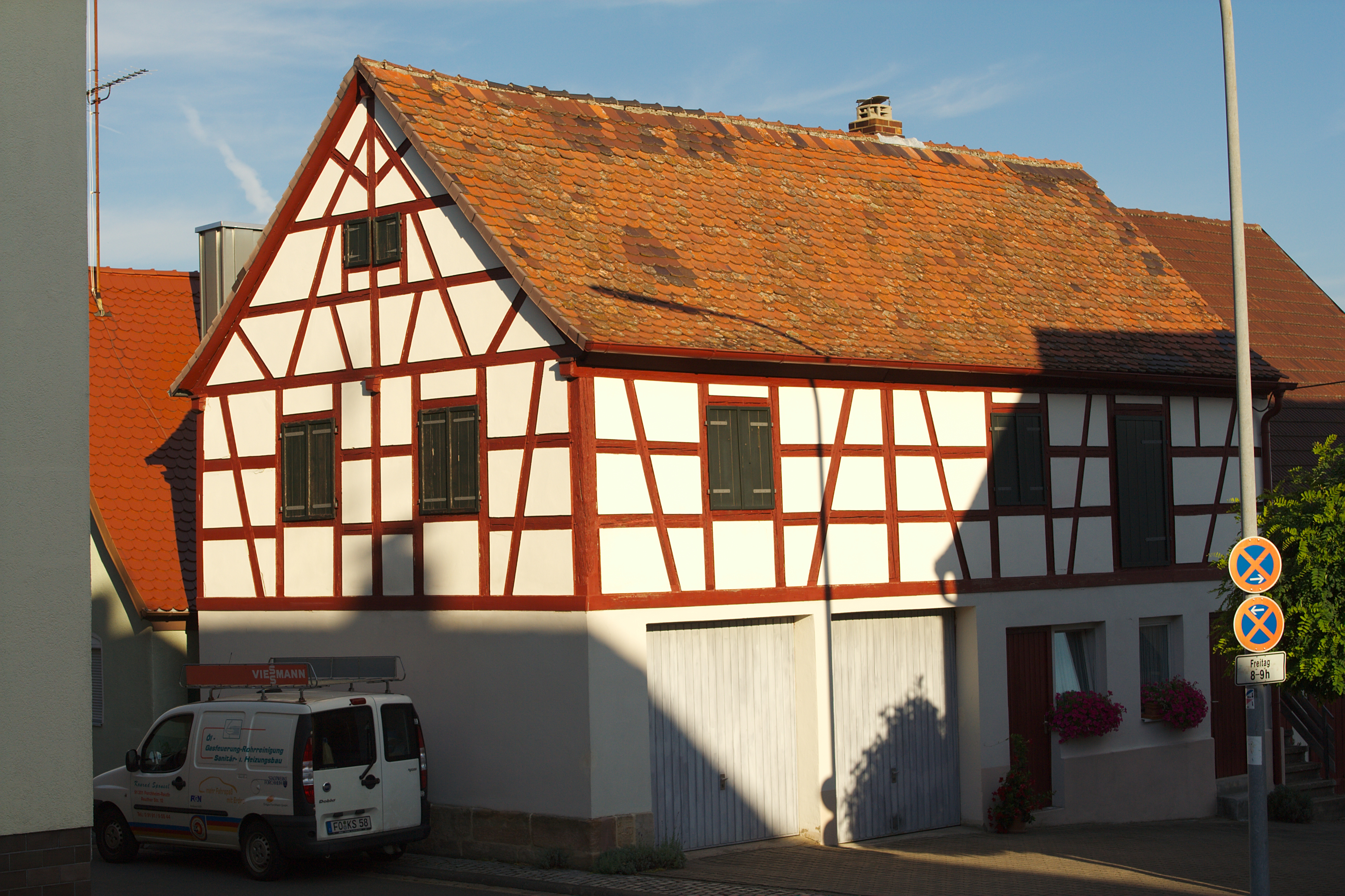 Remise, zweigeschossiger Giebelbau, Sandsteinquader und Fachwerk, 1. Hälfte 18. JahrhundertThis is a photograph of an architectural monument.